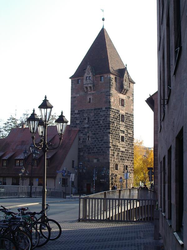 Nürnberg: sog. "Männereisen" oder Schuldturm gleich östlich beim Heilig-Geist-Spital, Bestandteil der "Vorletzten Stadtmauer" (ca. 2003-12-17). Von NW aufgenommen (November 2003)